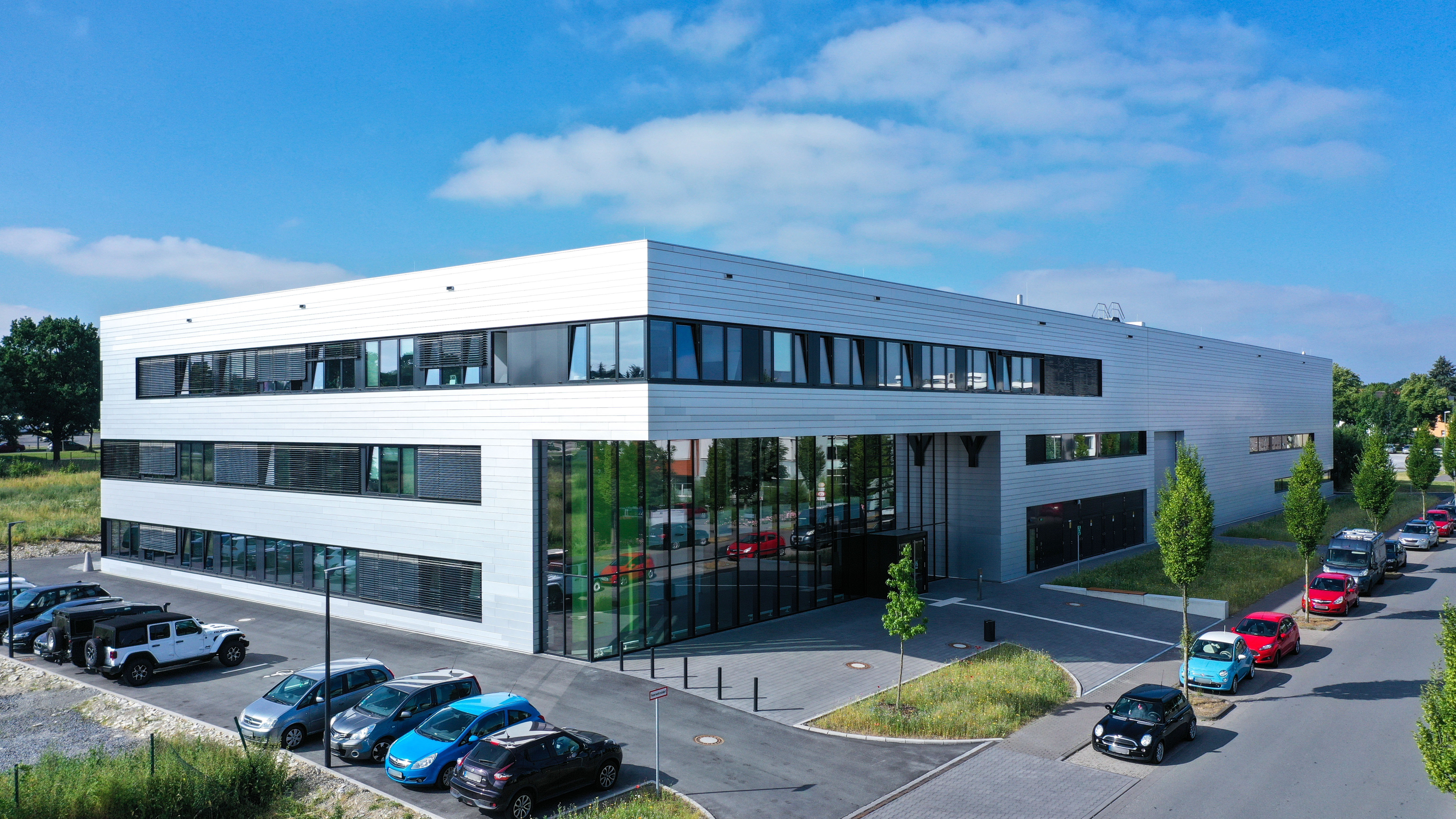 Gebäude Y